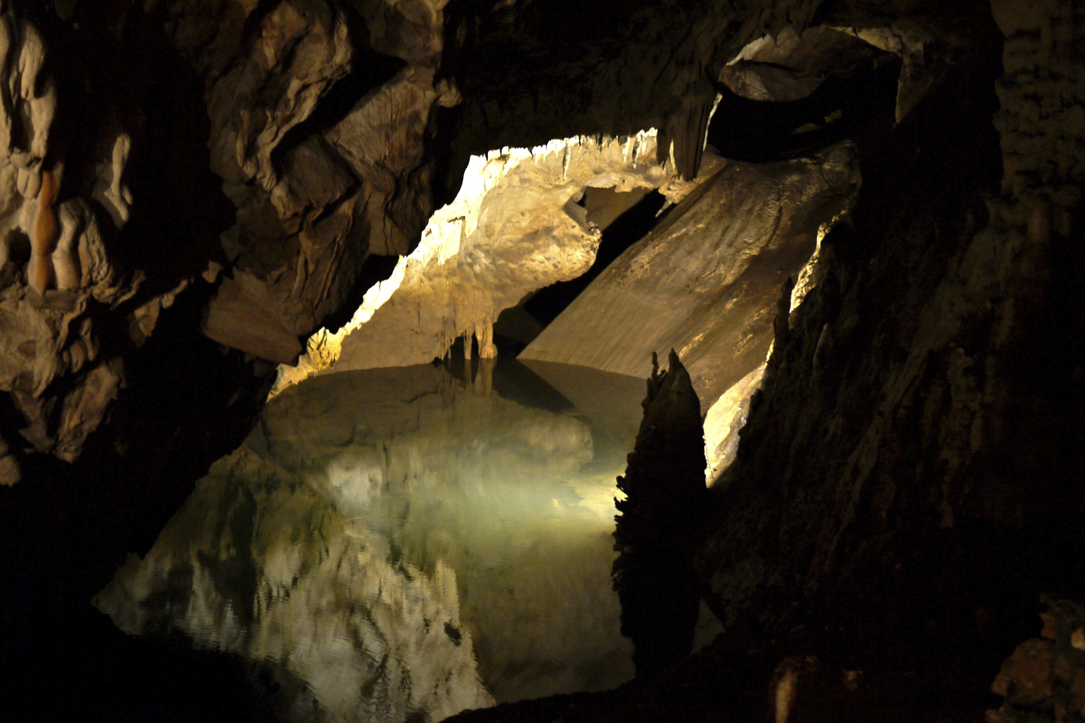 Cave lake